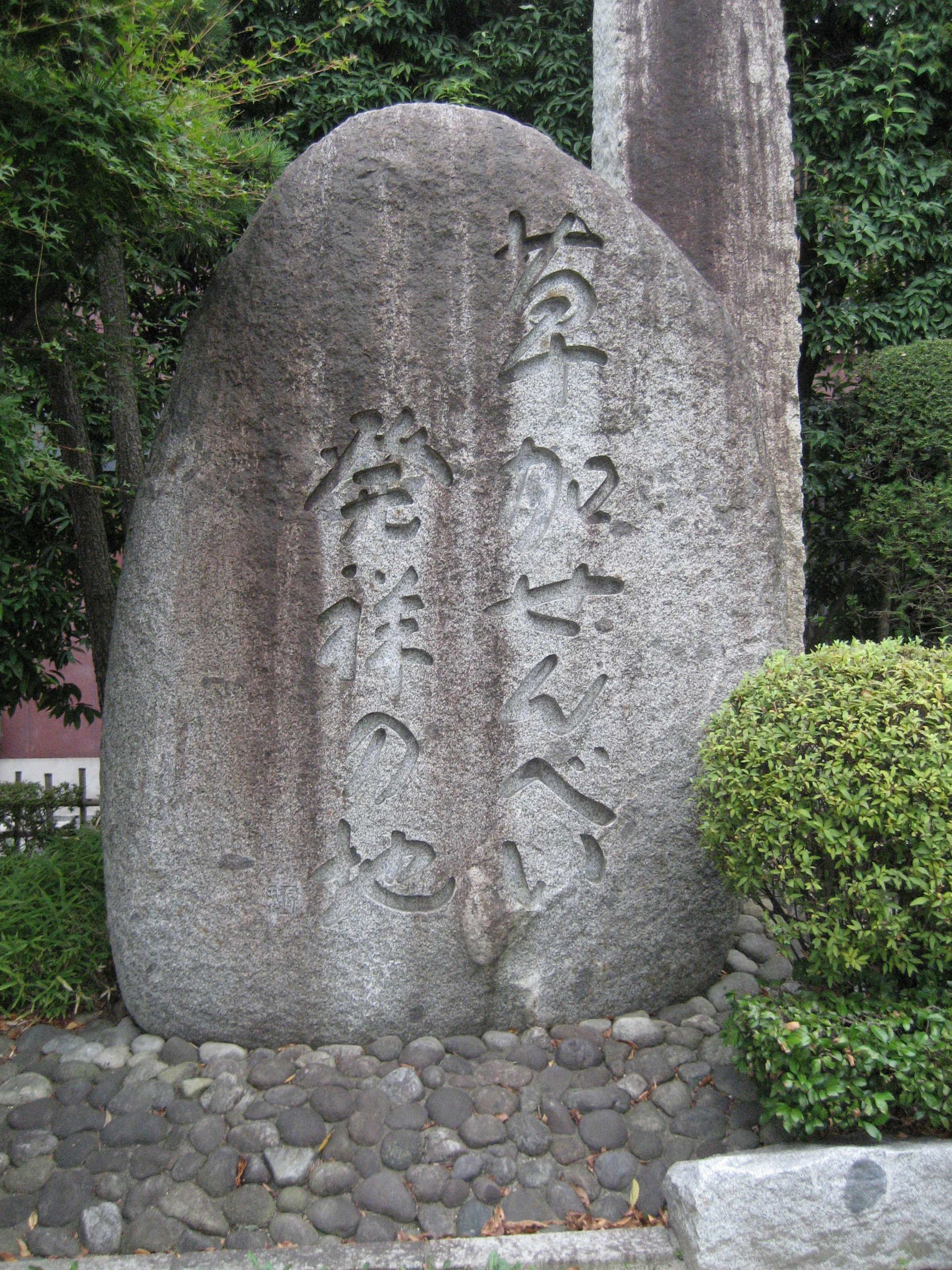 草加せんべい発祥の地の碑草加市神明町